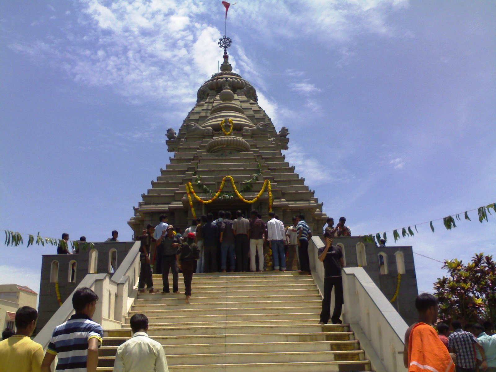 ଓଡ଼ିଆ: ଏହା ହେଉଛି ଚେନ୍୍ନାଇରେ ଥିବା ଜଗନ୍ନାଥ ମନ୍ଦିରର ମୁଖ୍ୟ ମନ୍ଦିର